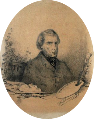 Portret van Willem Pieter Hoevenaar (1808-1863) getekend door zijn zoon Jozef Hoevenaar (1840-1926)